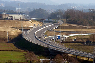 variante